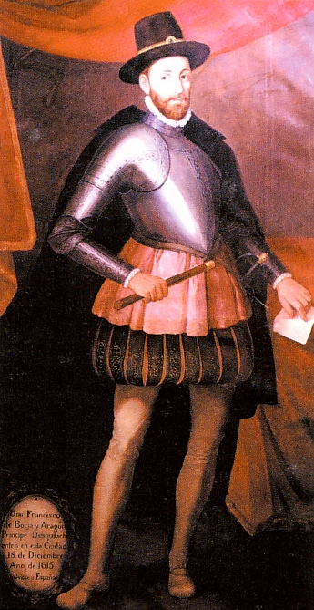 Francisco de Borja y Aragón, Príncipe de Esquilache (1581-1658), XII Virrey del Perú (1616-1621)